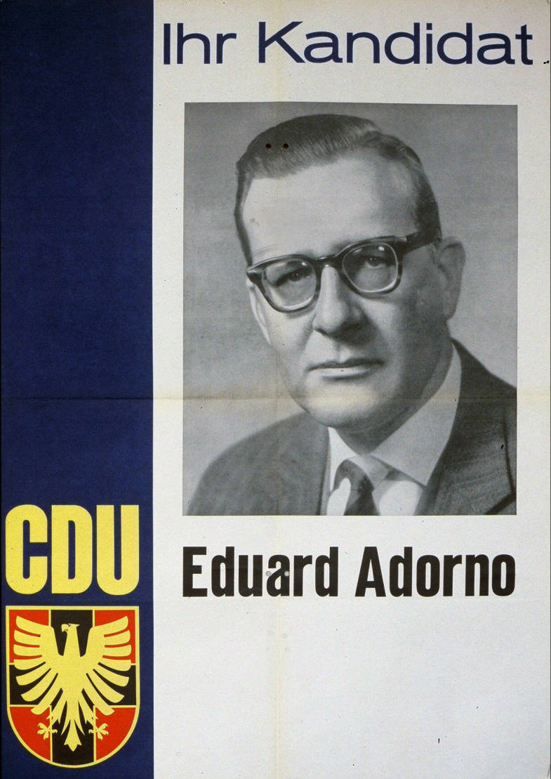 Ihr Kandidat Abbildung: Porträtfoto Plakatart: Kandidaten-/Personenplakat mit Porträt Auftraggeber: Verantw.: CDU-Bundesgeschäftsstelle Bonn Drucker_Druckart_Druckort: Repro-Druck, Schmiden bei Stuttgart Objekt-Signatur: 10-001: 982 Bestand: Plakate zu Bundestagswahlen (10-001) GliederungBestand10-18: Plakate zu Bundestagswahlen (10-001) » Die 4. Bundestagswahl am 17. September 1961 » CDU » Mit Porträtfoto Lizenz: KAS/ACDP 10-001: 982 CC-BY-SA 3.0 DE